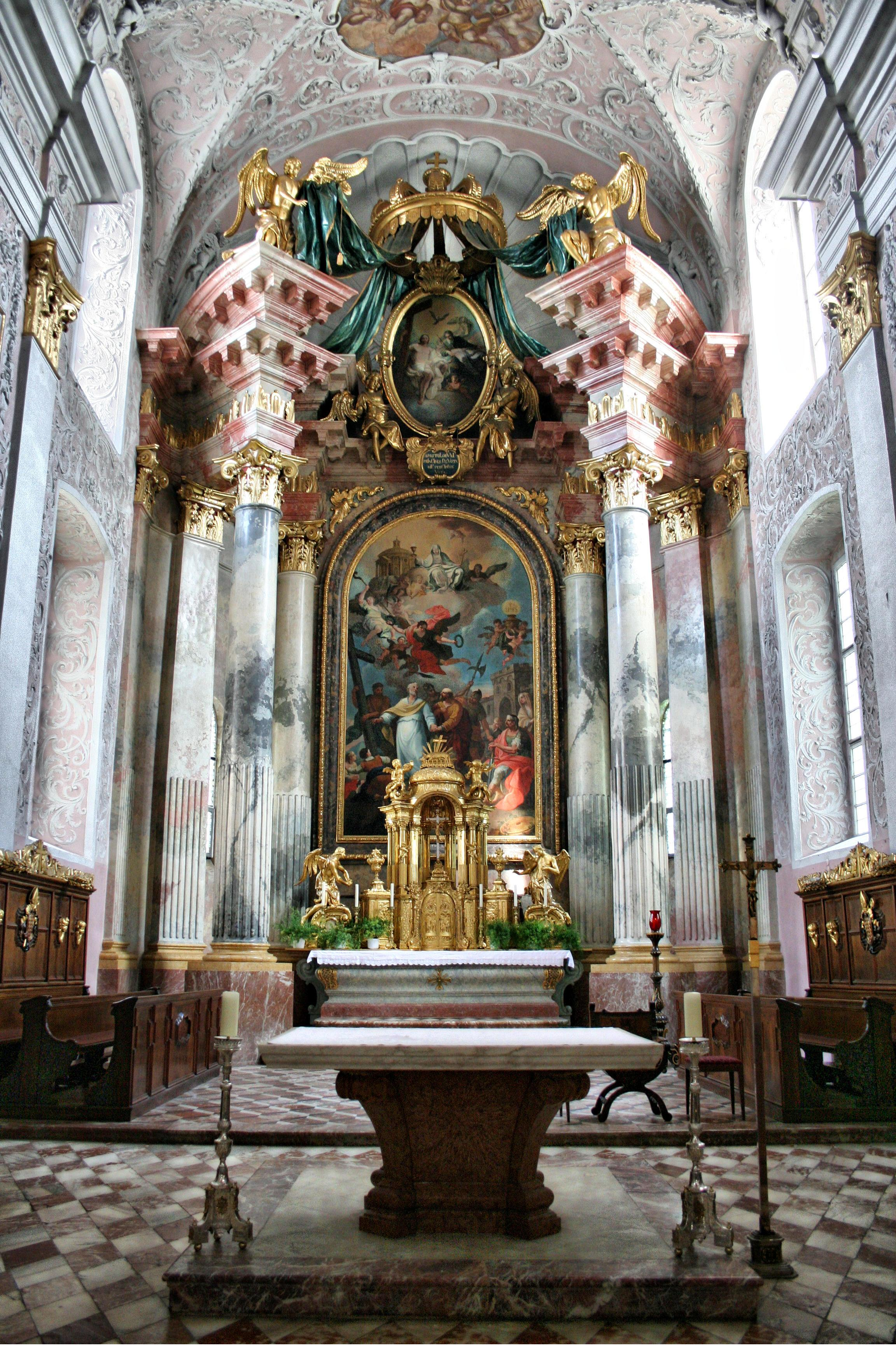 Dom und Stadtpfarrkirche hll. Petrus und Paulus